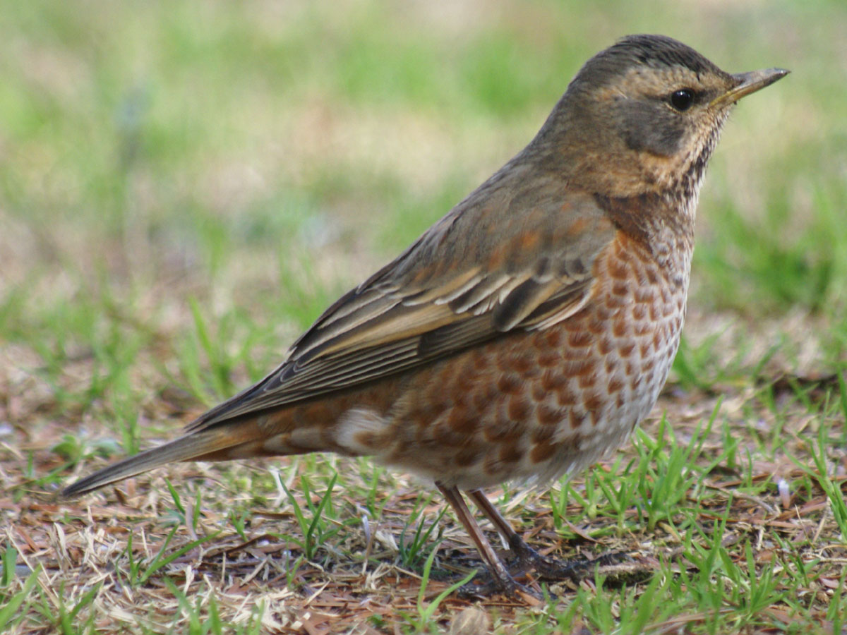 ハチジョウツグミ。京都市内にて。